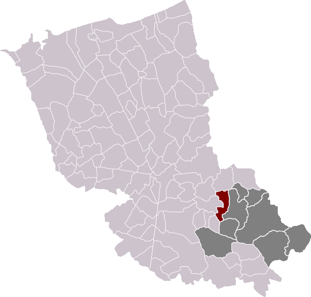 Locatie gemeente Vleteren in arrondissement Duinkerke. Zelfgemaakt. Location of Flêtre municipality in the arrondissement of Dunkirk. Self made. Localisation de la commune de Flêtre dans l'arrondissement de Dunkerque. Fait moi-même.